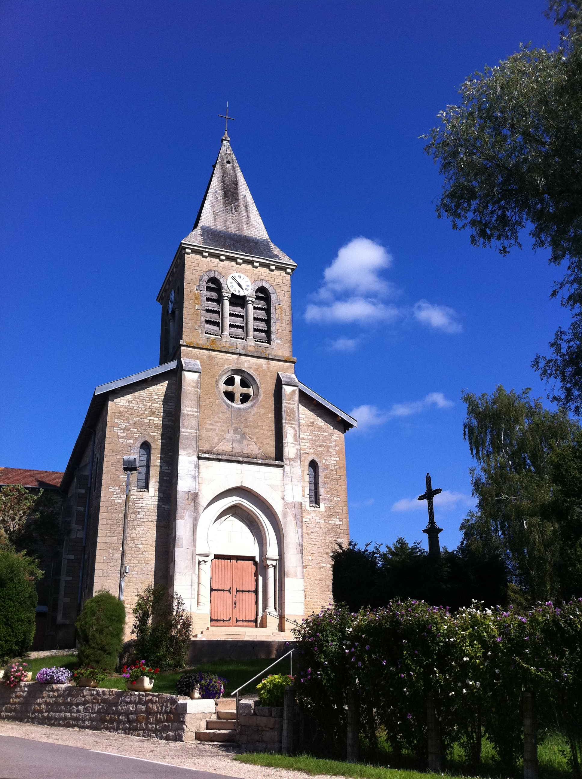 Église Saint-Laurent de Curciat-Dongalon, Ain, France.